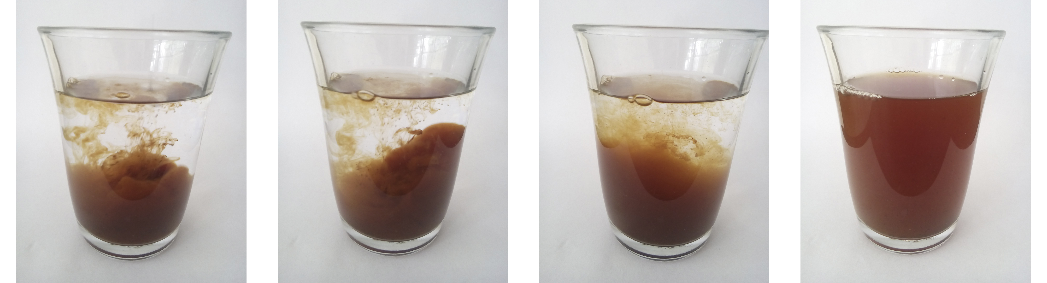 Proceso de solubilidad de hidrocaroteno